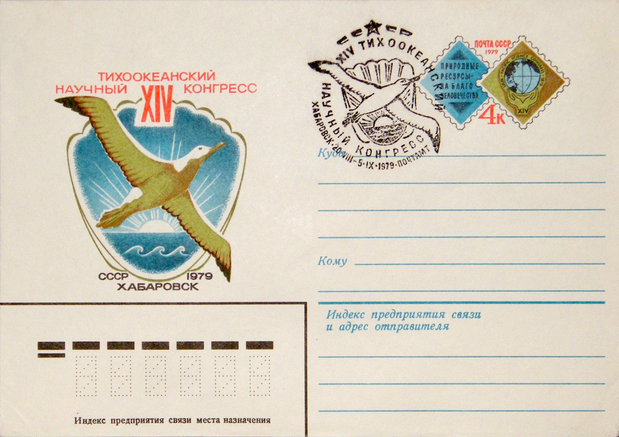 Конверт Министерства связи СССР с оригинальной почтовой маркой. Посвящён XIV Тихоокеанскому научному конгрессу, проходившему в Хабаровске в 1979 году.